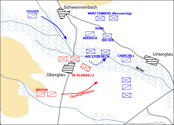 Det allierede angreb mod Oberglau, 1704